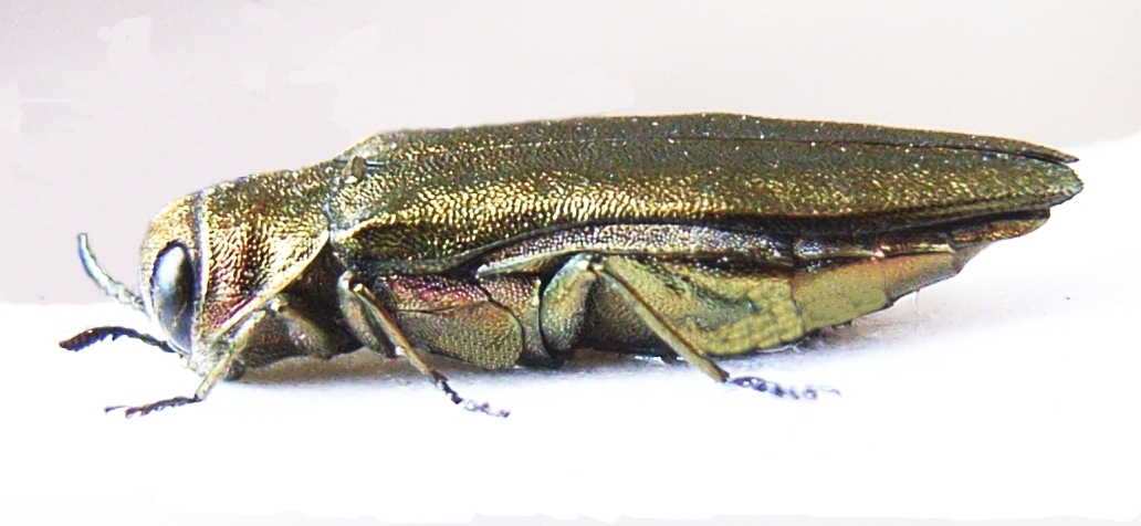 Side of Agrilus viridis